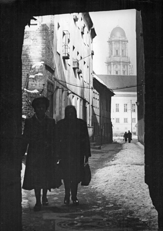 Berlin, Fischerstraße, Altbauten Zentralbild Schack 15.2.1952 Alt-Berlin An der Fischerstrasse. Im Hintergrund der Turm des Alten Stadthauses.